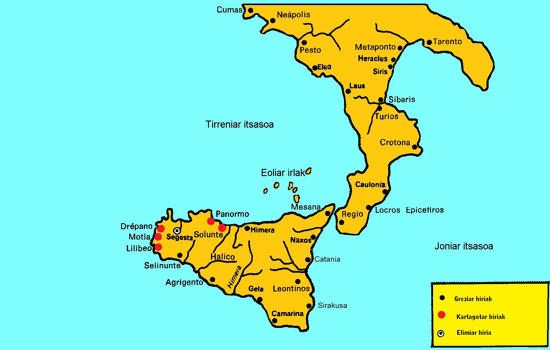 Grezia Handia